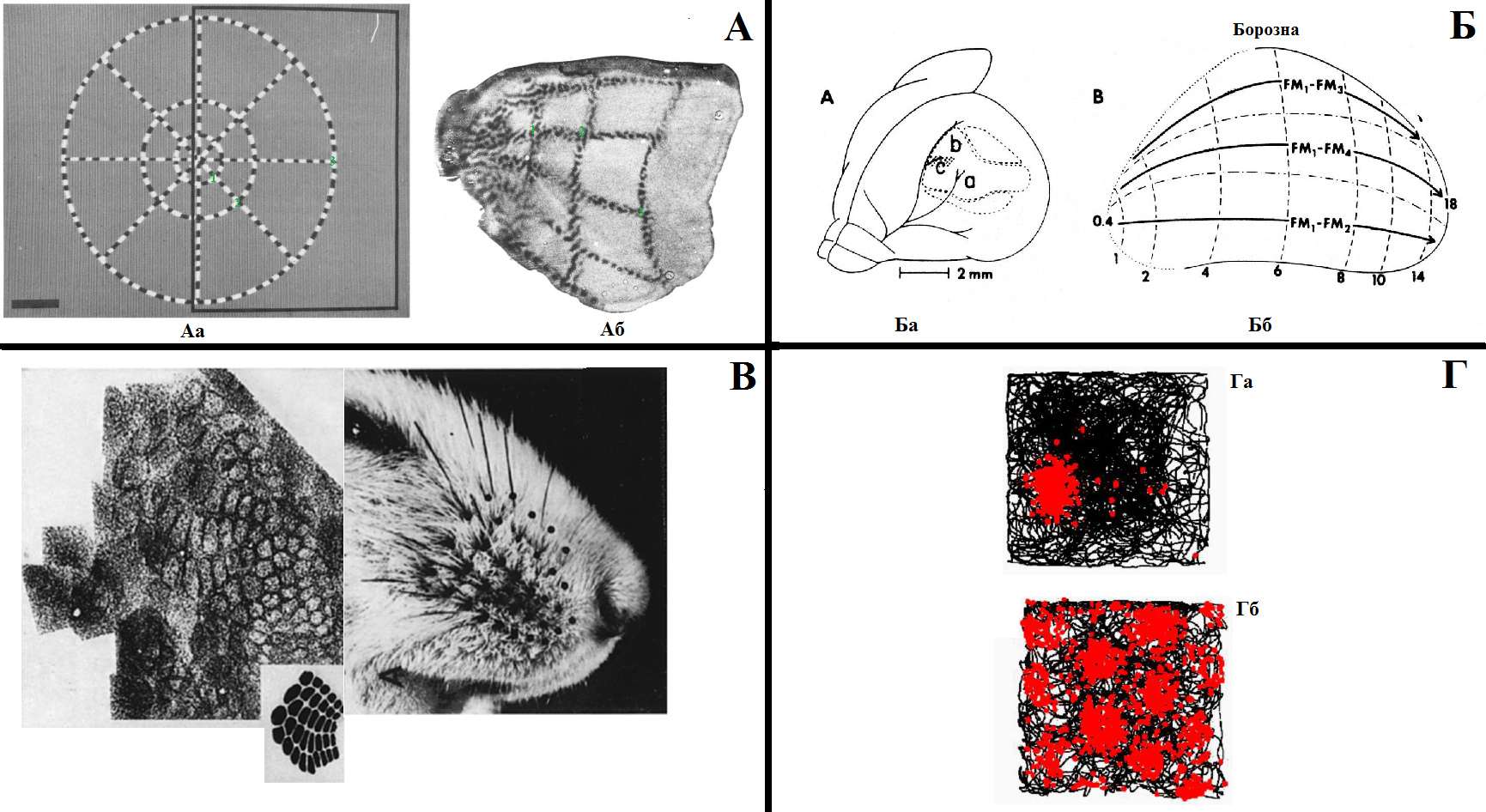 Ієрархія кіркової репрезентації - від слухової до енторіальної кори